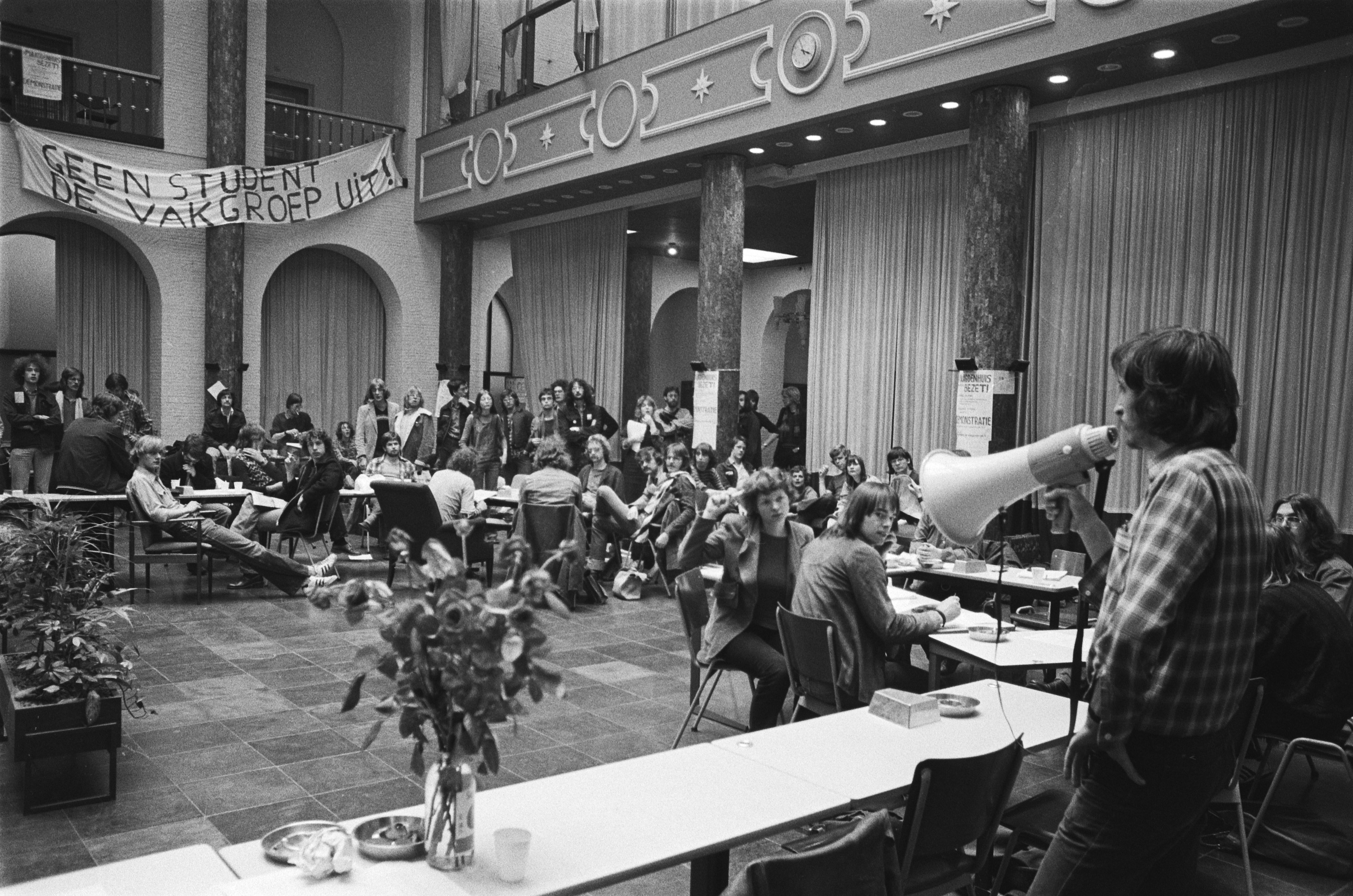 Collectie / Archief : Fotocollectie Anefo Reportage / Serie : [ onbekend ] Beschrijving : Amsterdam, Maagdenhuisbezetting; overzicht vergadering bezettende studenten Datum : 26 april 1978 Locatie : Amsterdam, Noord-Holland Trefwoorden : STUDENTEN, Vergaderingen, bezetting Fotograaf : Peters, Hans / Anefo Auteursrechthebbende : Nationaal Archief Materiaalsoort : Negatief (zwart/wit) Nummer archiefinventaris : bekijk toegang 2.24.01.05 Bestanddeelnummer : 929-6885